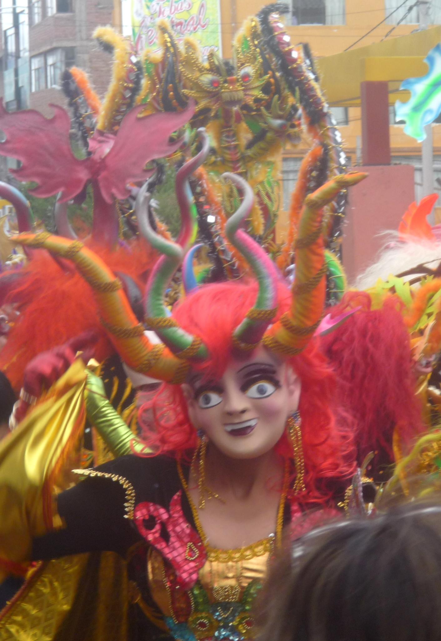 Fiesta de la Candelaria 2013